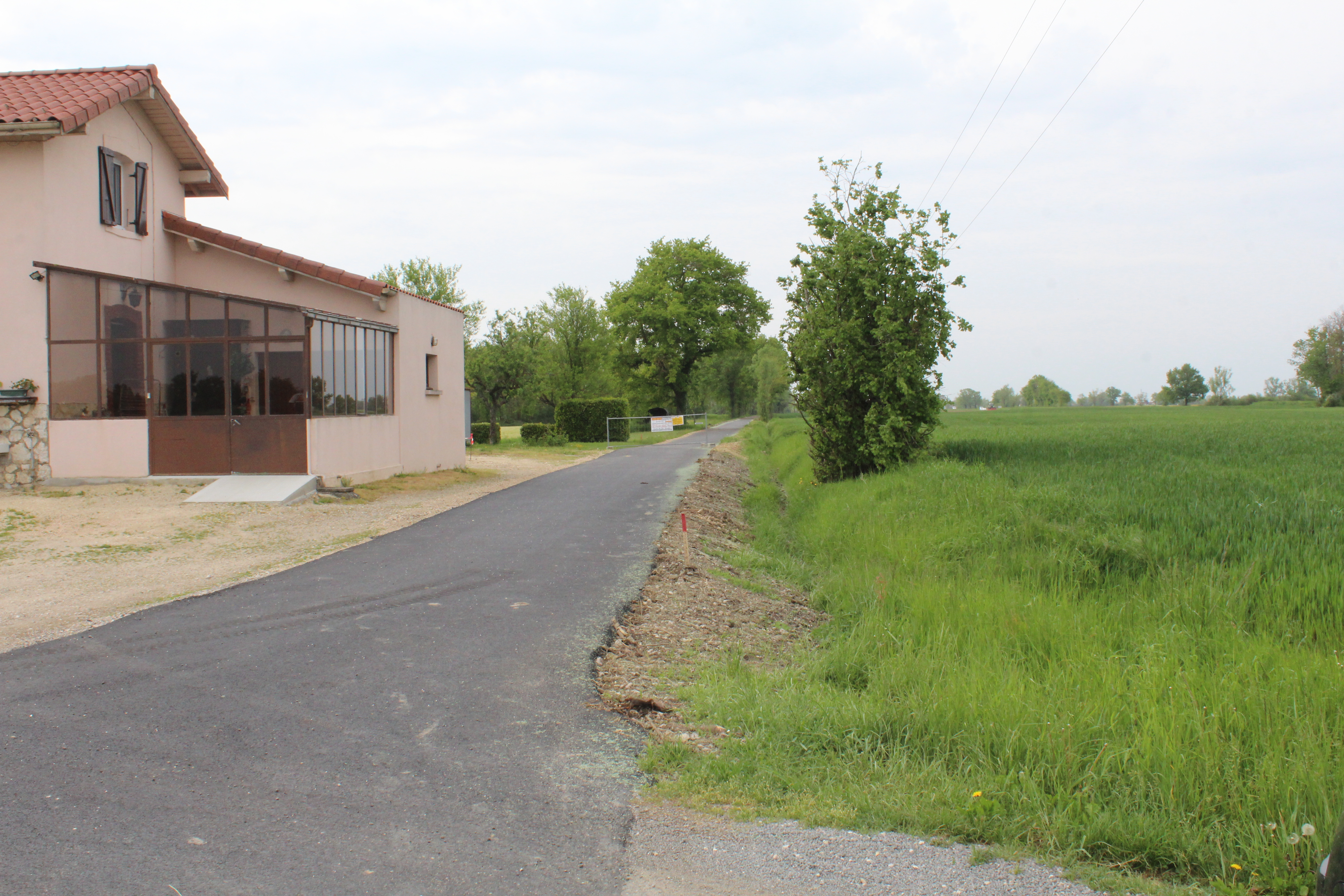 Voie verte allant d'Attignat à Jayat, Cras-sur-Reyssouze.